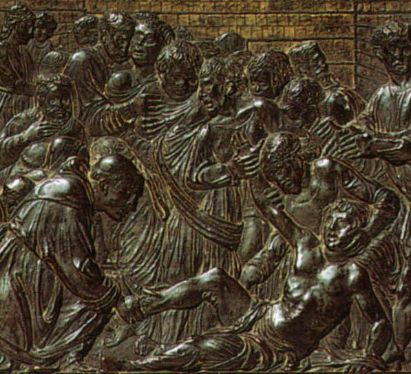 Donatello, miracolo del figlio pentito, dettaglio